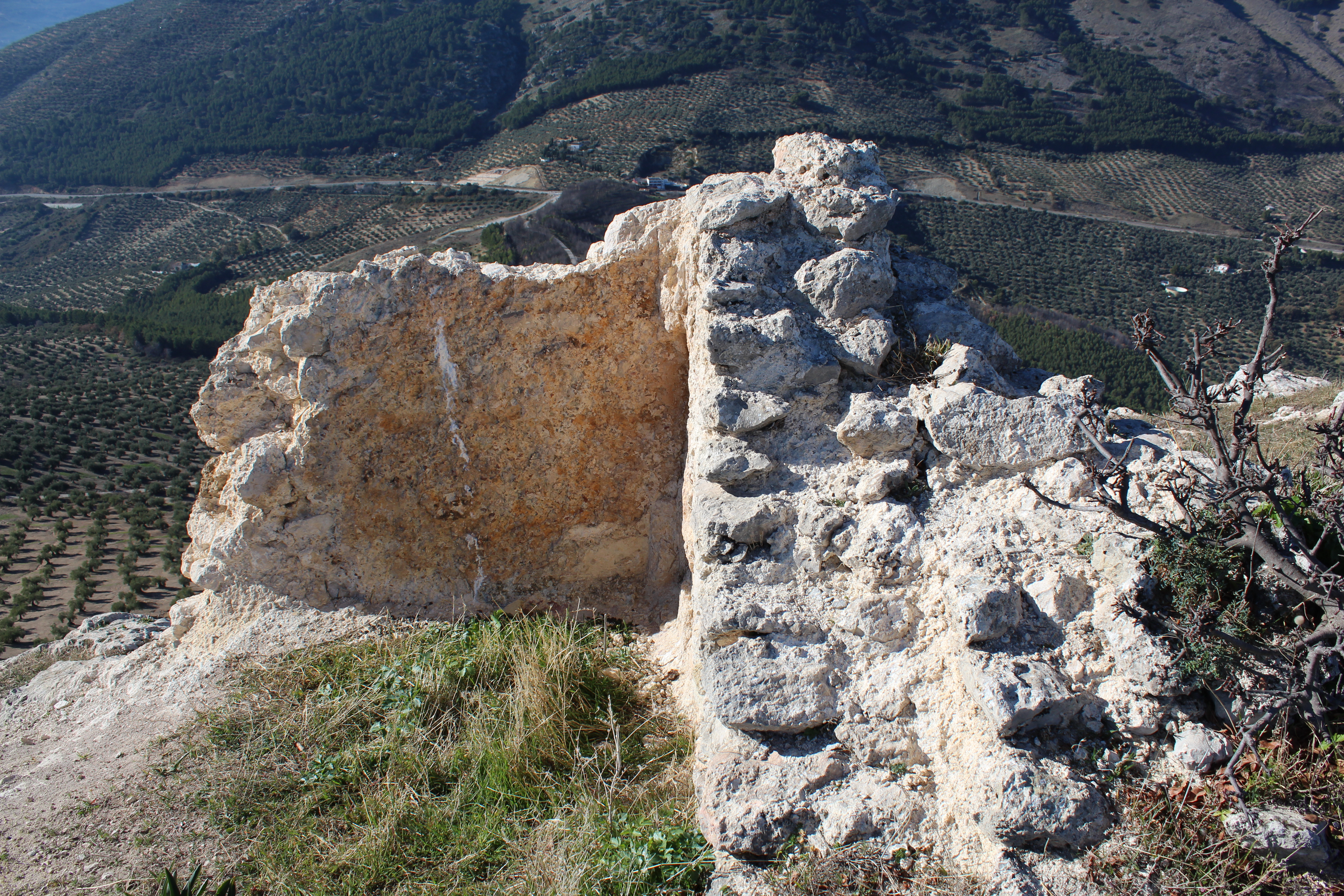 Detalle de la torre del Castillo de las Peñas de Castro.